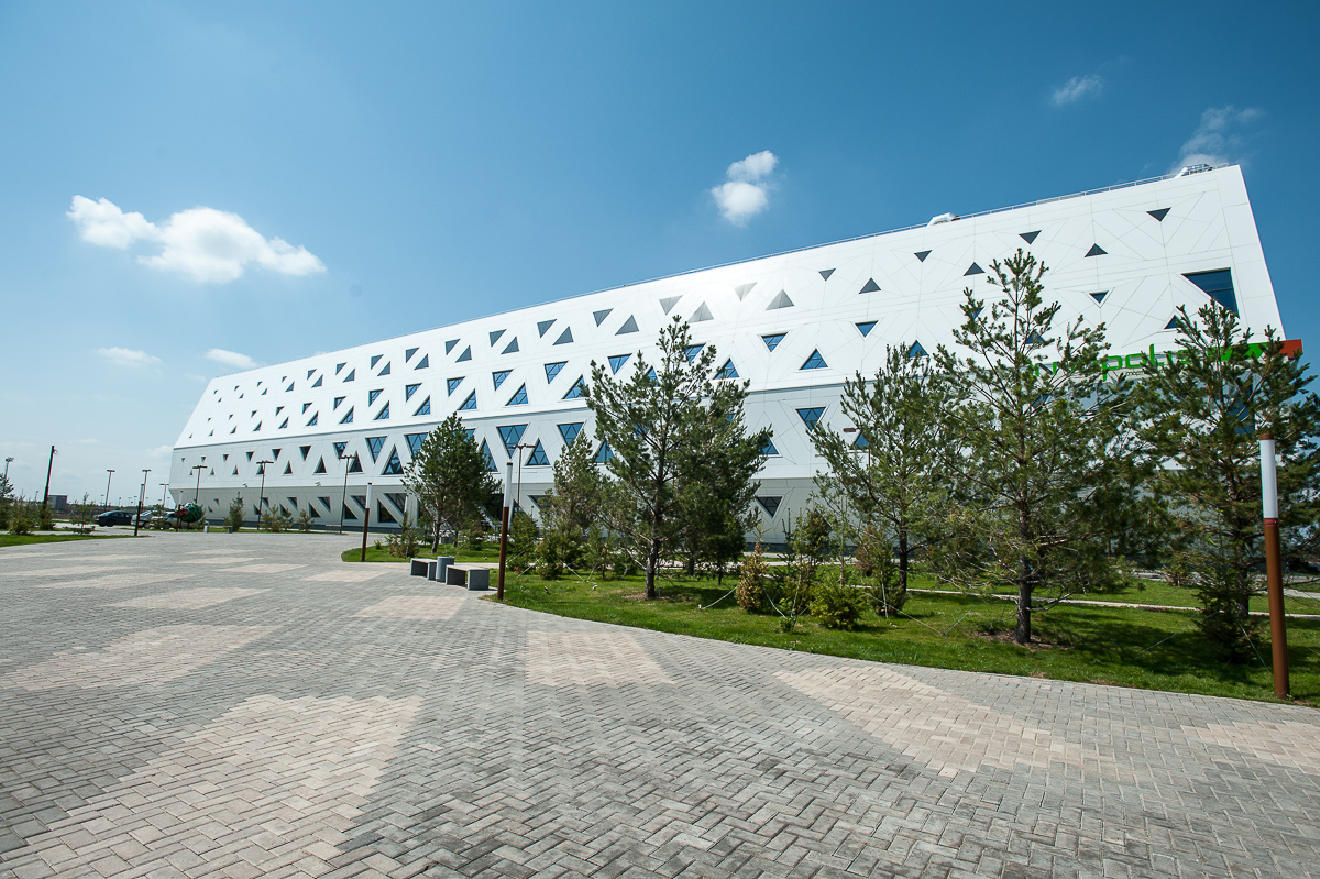 Здание спортивного комплекса в Иннополисе